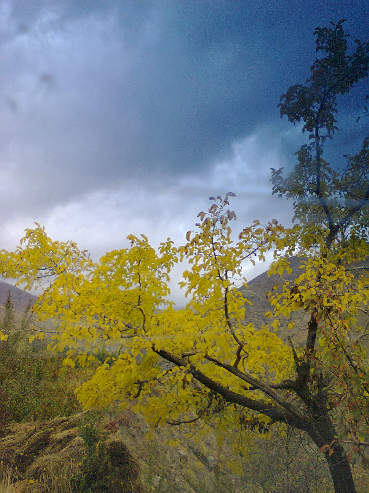 پاییز